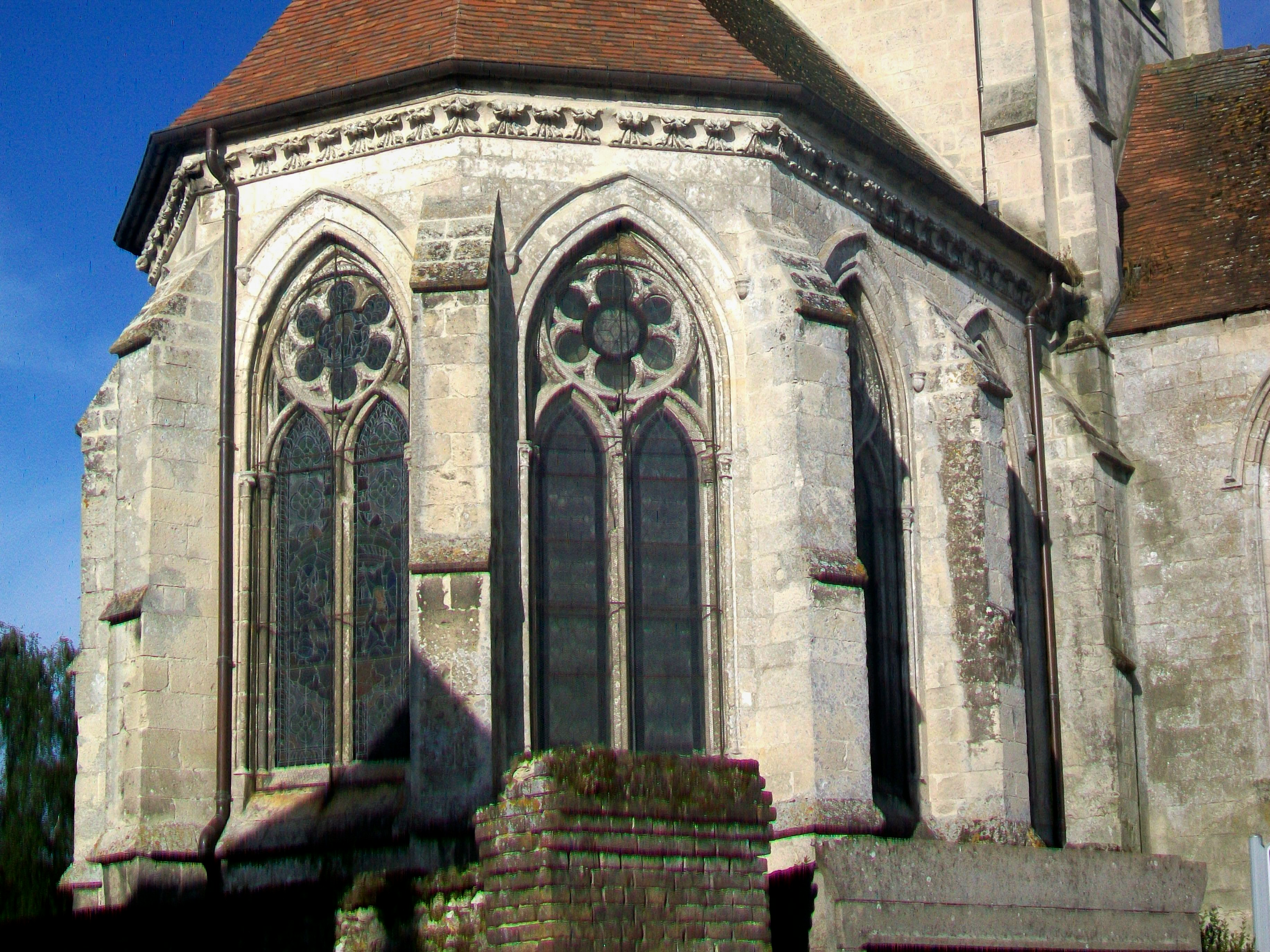 Le chœur, depuis l'est.